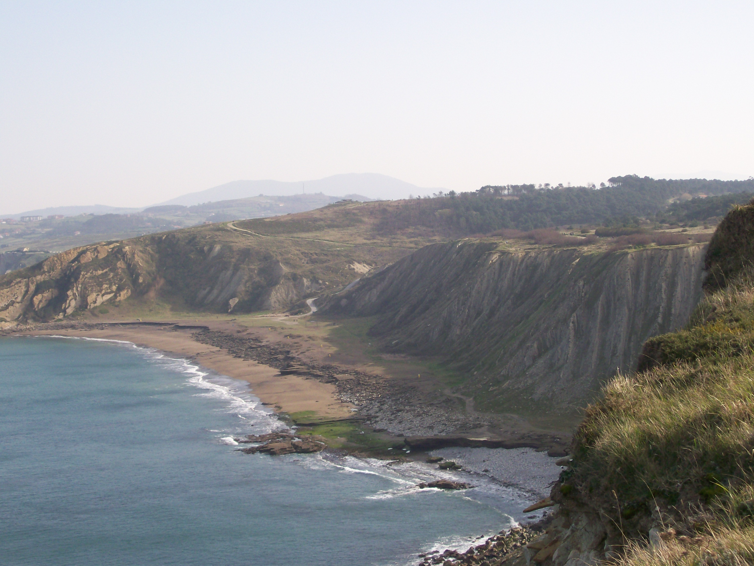 Azkorri hondartzaren ikuspegia